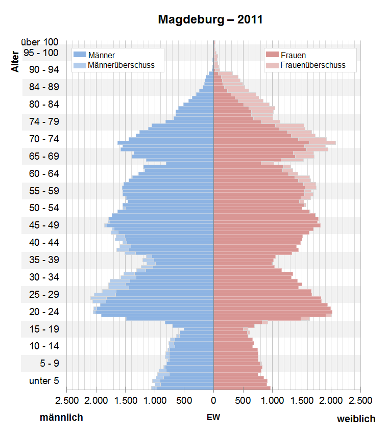 Bevölkerungspyramide der Stadt Magdeburg nach Zensus 2011.